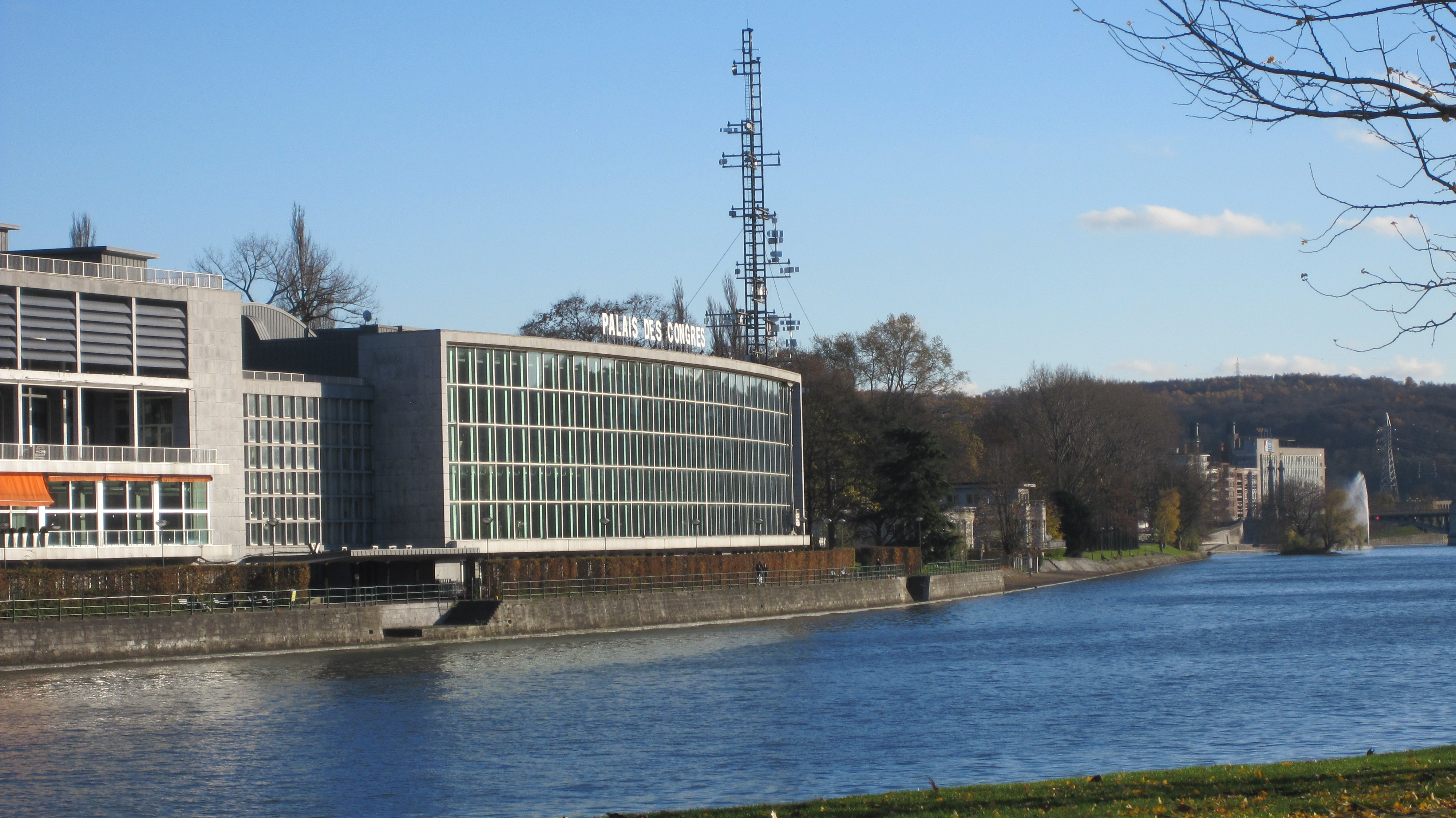 Palais des Congrès et tour cybernétique